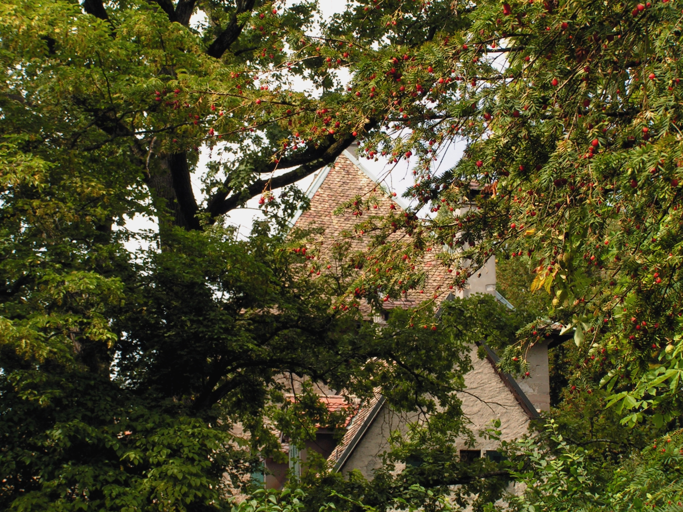 Chemin du Milieu 25, Collonge-Bellerive. Château de Bellerive.